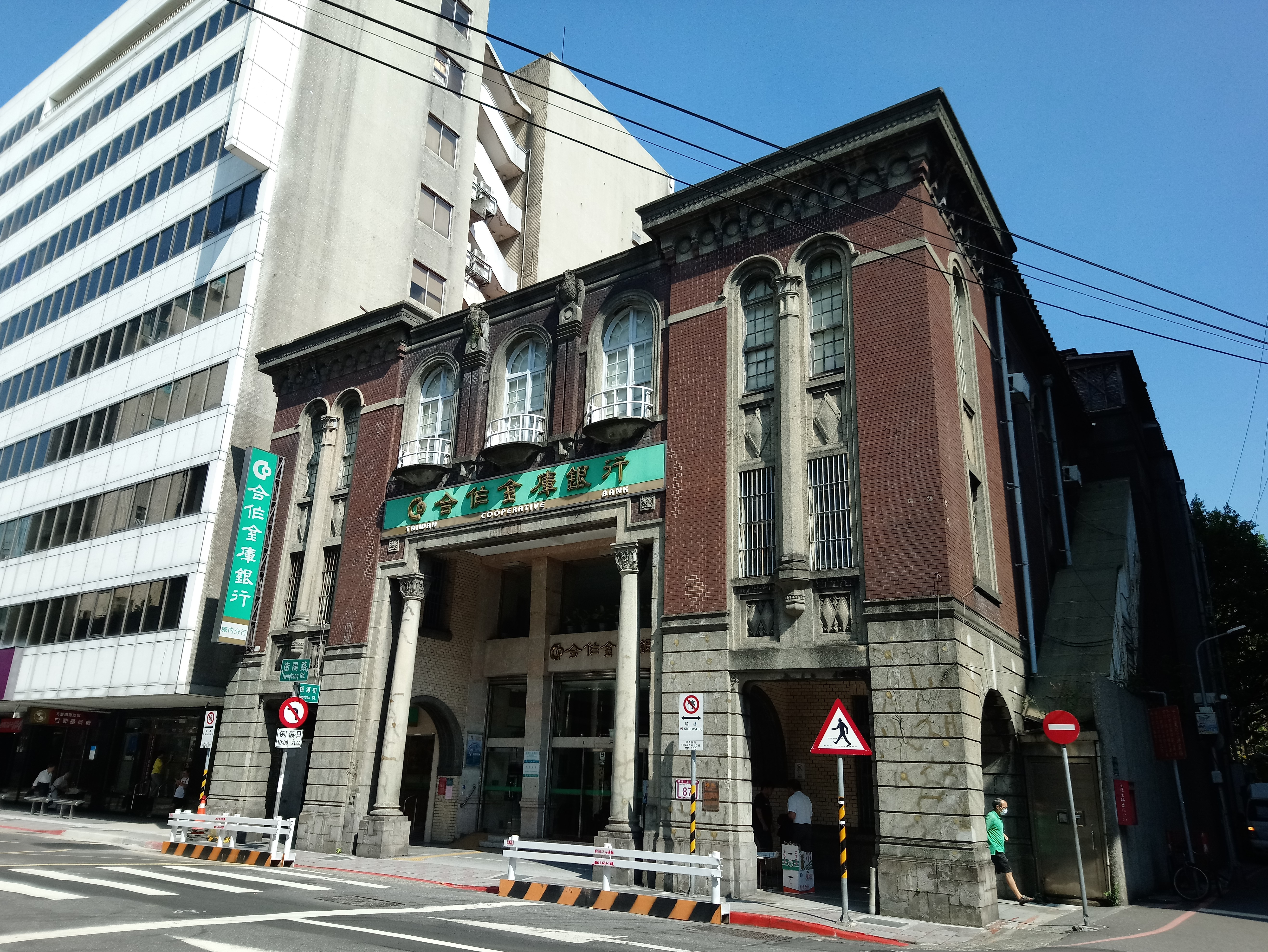 原臺北信用組合,台北市中正區城內次分區光復里